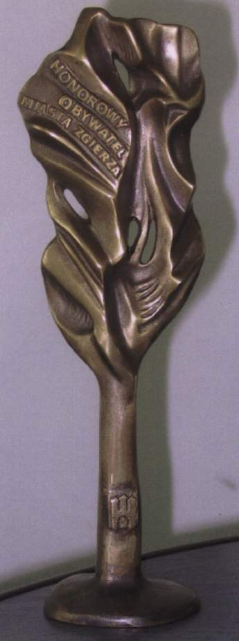 Wzór statuetki "Honorowy Obywatel Miasta Zgierza".